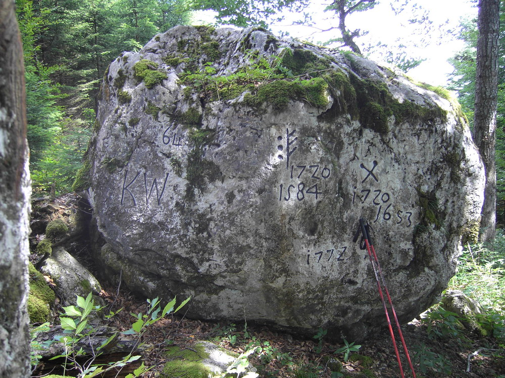 Felsmarch von 1584 zwischen dem Landgericht Tölz (Mitte) und dem Kloster Benediktbeuern (rechts) am Langeneck oberhalb Jachenau, ganz links die Kennzeichnung von 1839: KW=Königlicher Wald und 64 als lfd. Nummer der Grenzmarkierung.